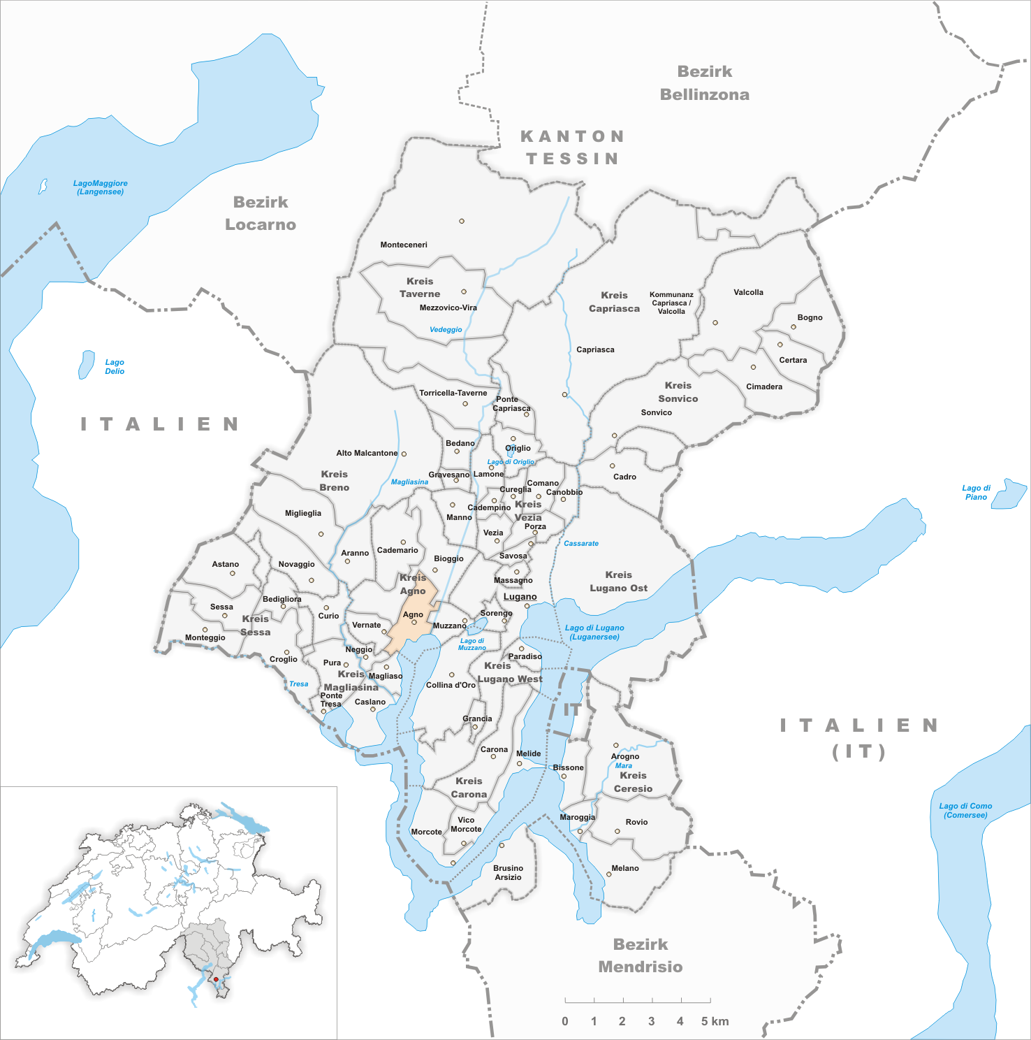 Municipality Agno